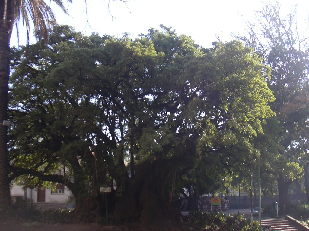 Fotografía de un Phytolacca dioica (Ombú) de la plaza Barrancas de Belgrano, en el barrio Belgrano de Buenos Aires./Picture of a Phytolacca dioica from the Barrancas de Belgrano park in the barrio Belgrano in Buenos Aires.